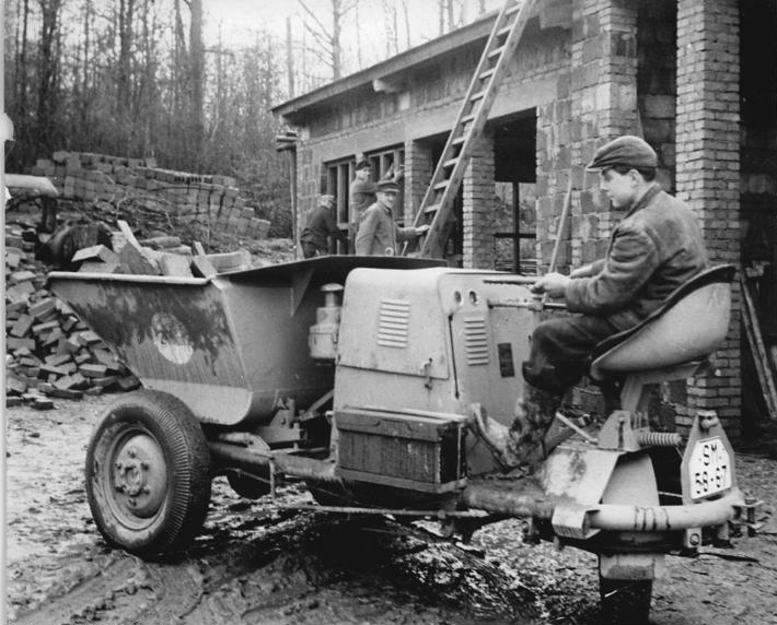 LPG Löbichau, Baubrigade im Einsatz Zentralbild Schaar Gal-At 9.12.1961 Die Baubrigade der LPG "Theodor Körner" in Löbichau , Kreis Schmölln steigerte die Arbeitsproduktivität durch zweckmäßige Maschinen . Neben einem Diesel-Kleindumper (unser Bild) wurden zwei Förderbänder und ein elektrischer Betonstampfer angeschafft . Das sind Auswirkungen des Besuchs einer Studiengruppe der LPG , die mit konkreten Aufträgen das Neuerer-Zentrum der diesjährigen Landwirtschaftsausstellung der DDR in Marckleeberg .